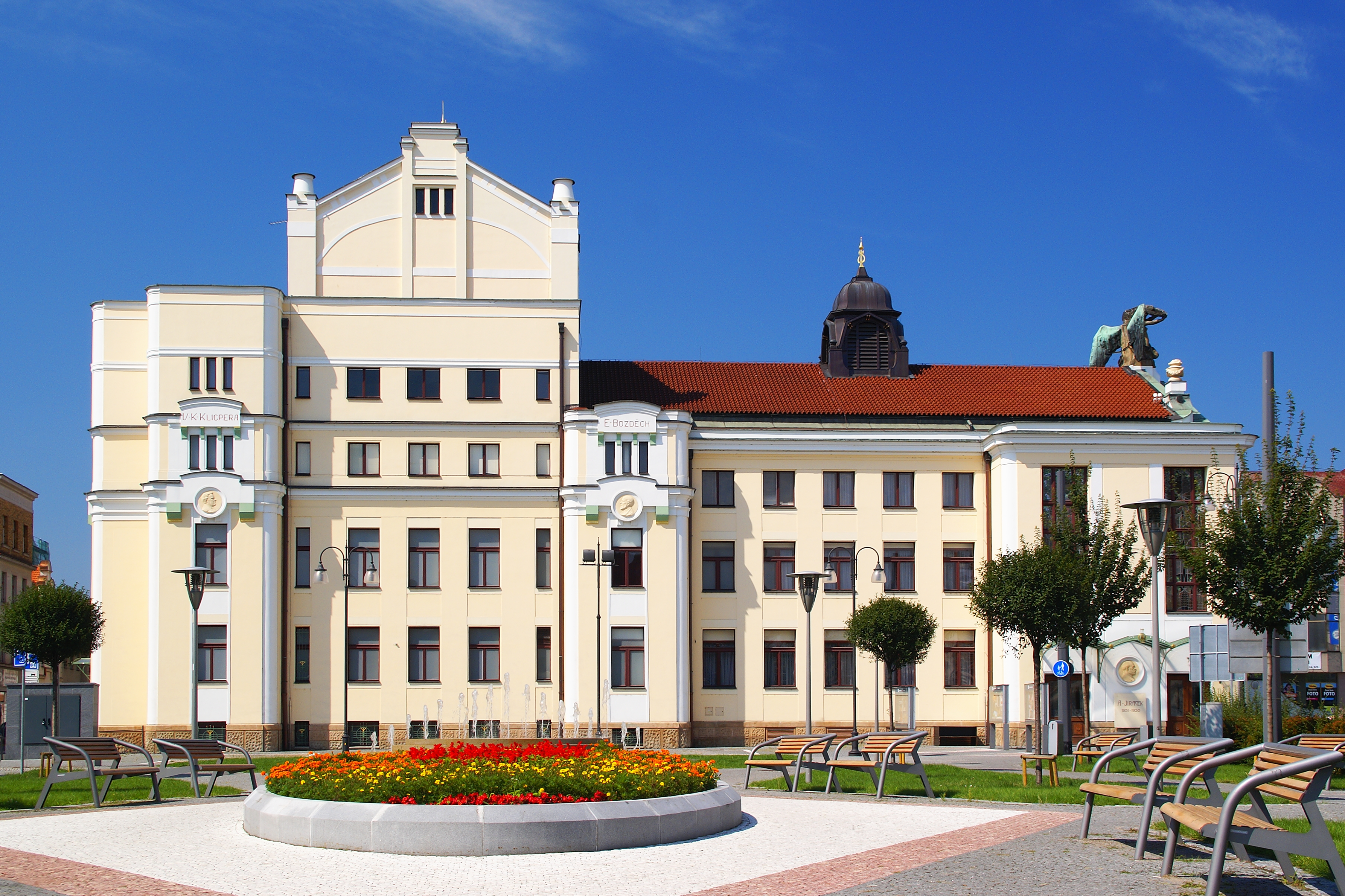 Východočeské divadlo v Pardubicích (původně Městské divadlo postavené v letech 1907 - 1909).